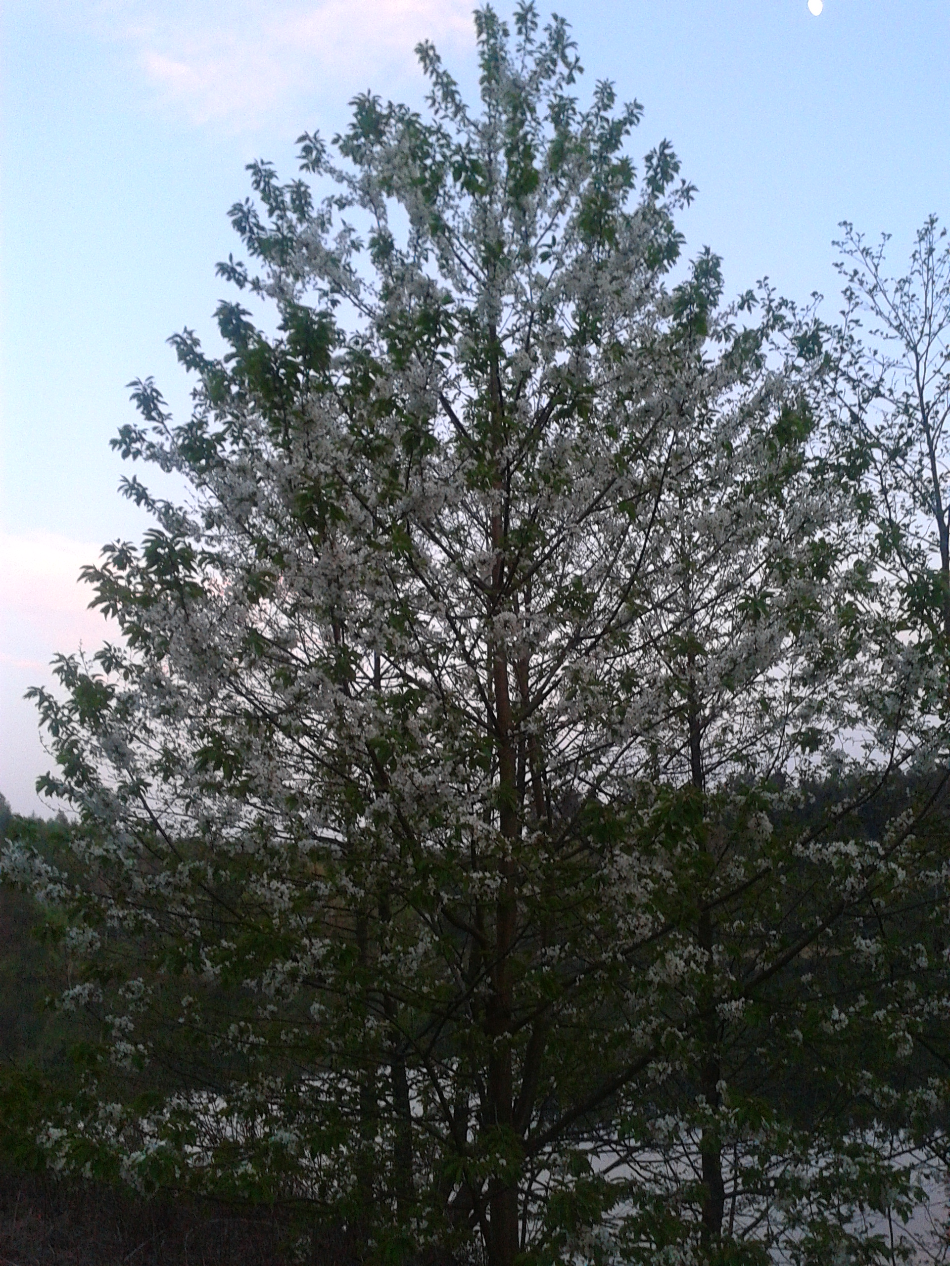 Neuer Teich Gernrode Es wird Nacht am Teich, der Mond geht über einem Kirschbaum in Ufernähe auf.